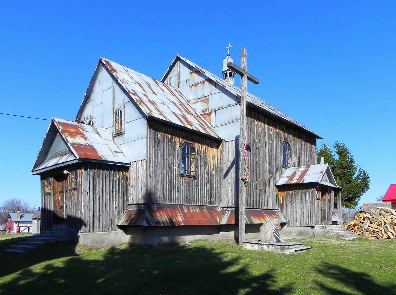 Cerkiew greckokatolicka p.w. św. Dymitra przejęta przez kościół katolicki, po wybudowania nowego kościoła, opuszczona i niszczejąca.